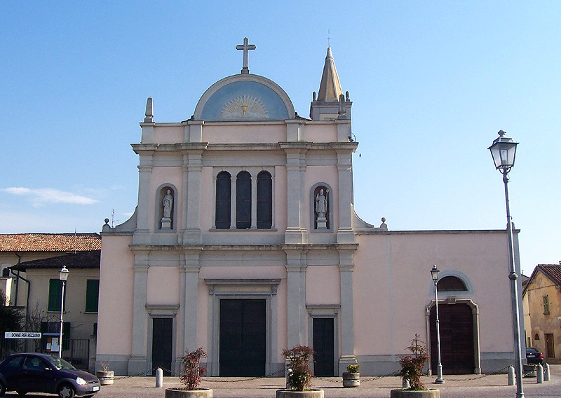 Truccazzano - Chiesa Parrocchiale di S. Michele